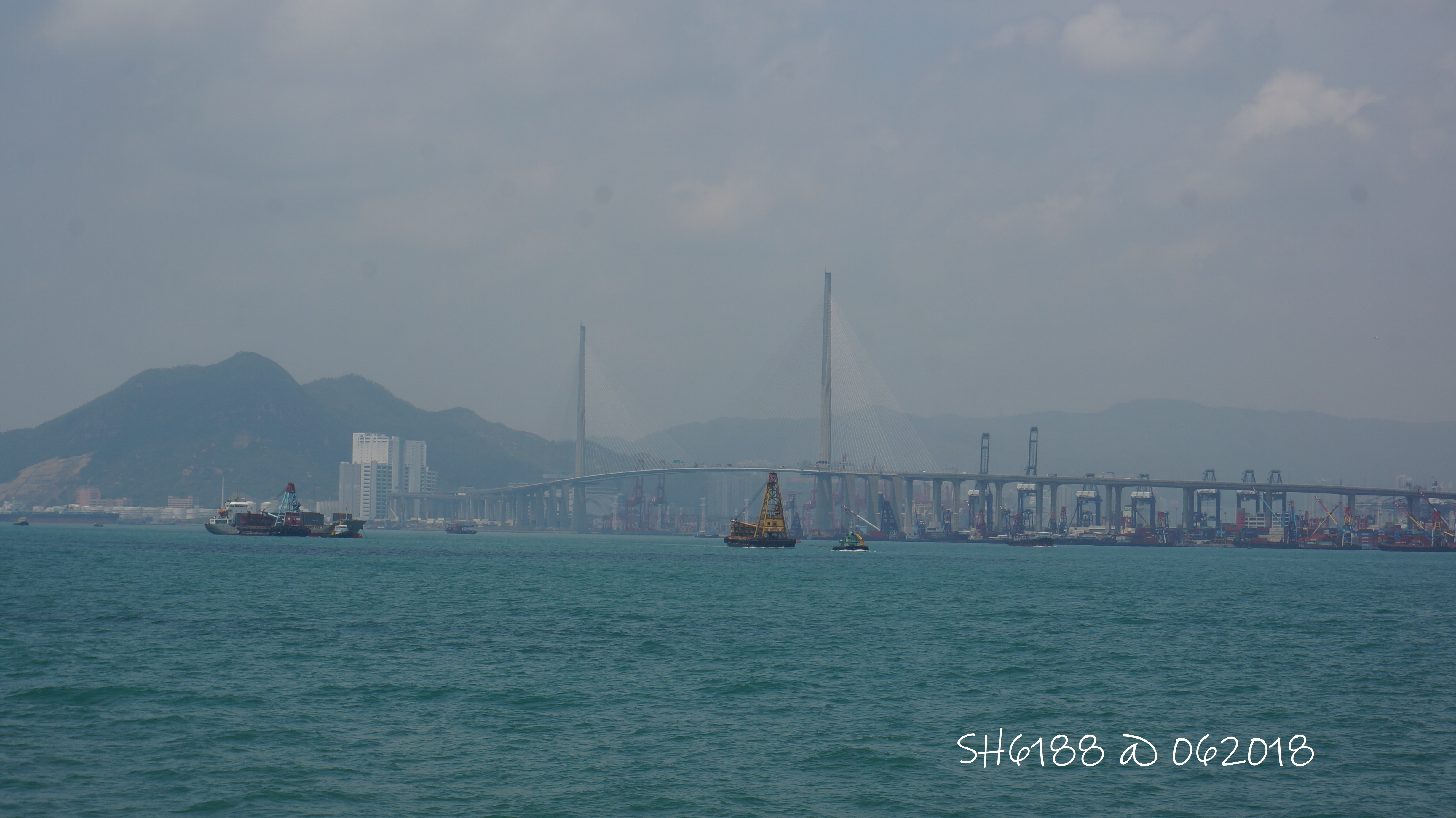 昂船洲大橋，2018年4月